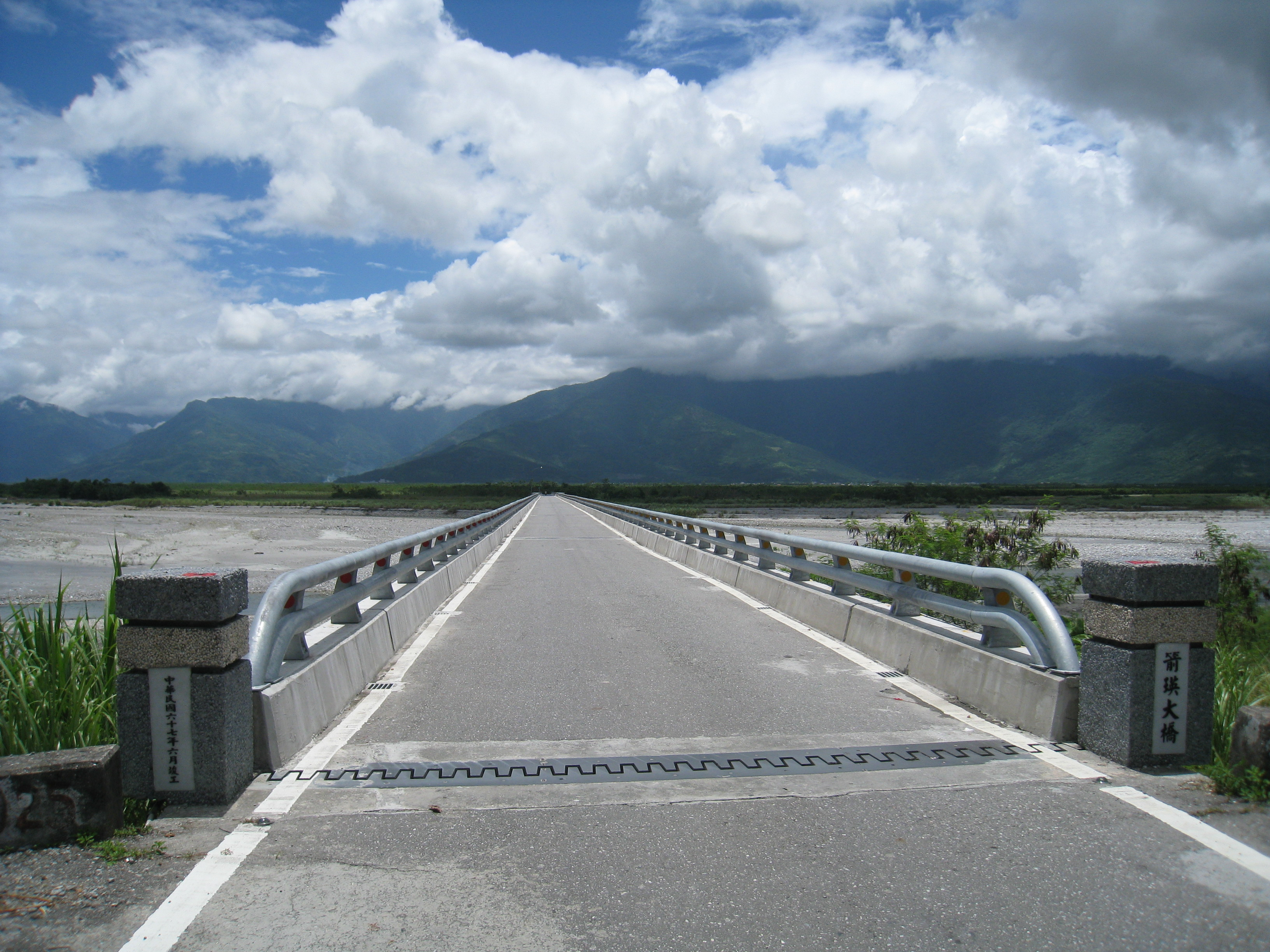 花蓮縣箭瑛大橋橋頭。